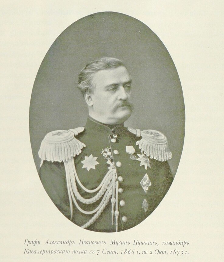 Граф Алекса́ндр Ива́нович Му́син-Пу́шкин (1827—1903)